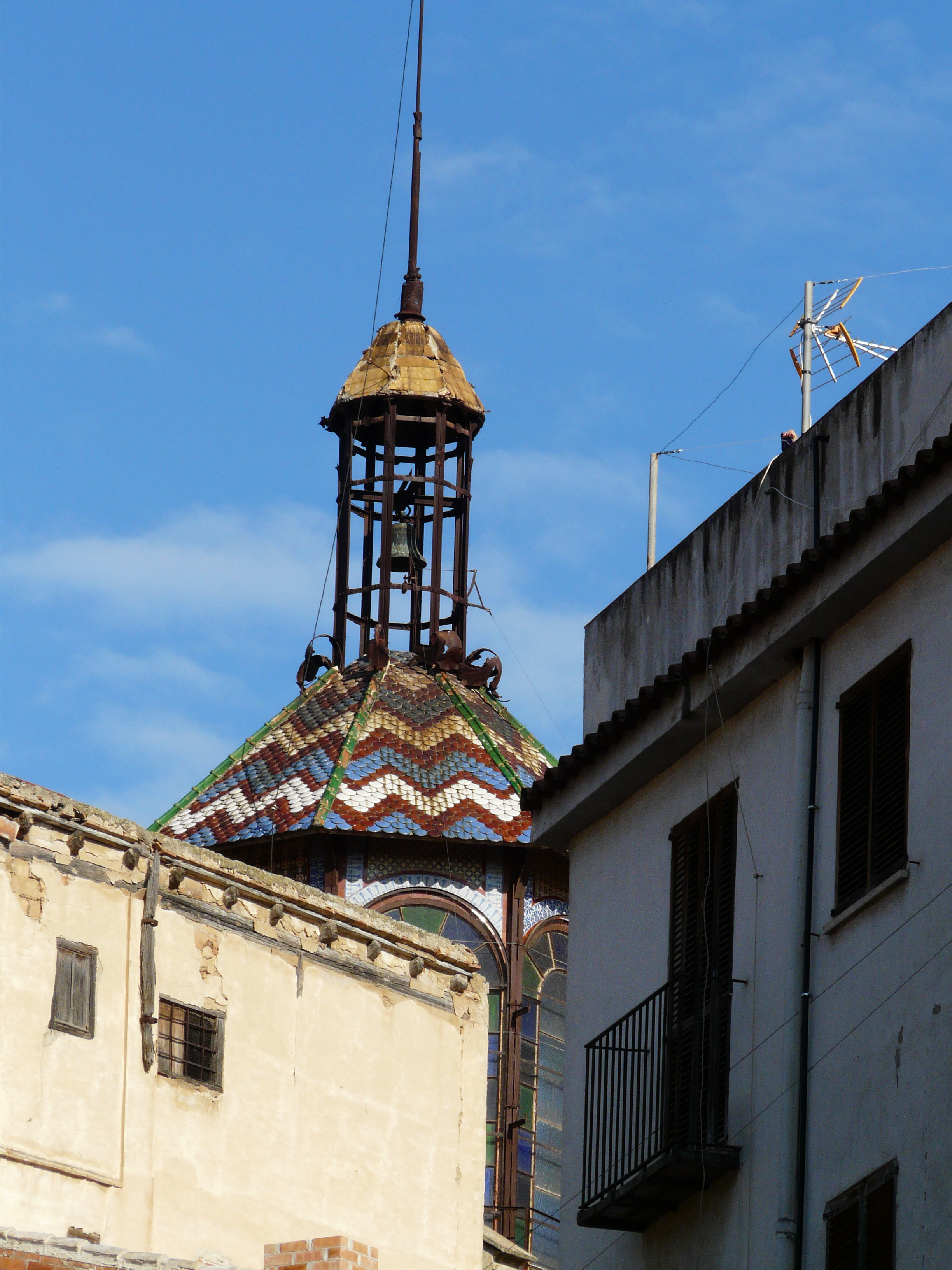 Temple de la Reparació (Tortosa) Object location40° 48′ 49.08″ N, 0° 31′ 22.83″ E